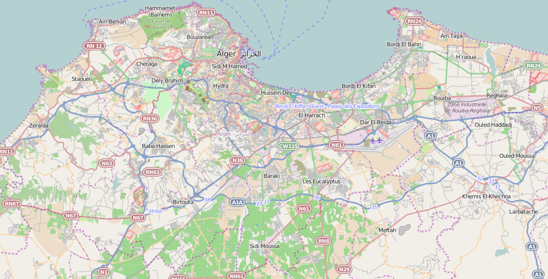 Map of Algiers Geographic limits of the map: N: 36.9016° S: 36.4986° W: 2.7171° E: 3.4655°